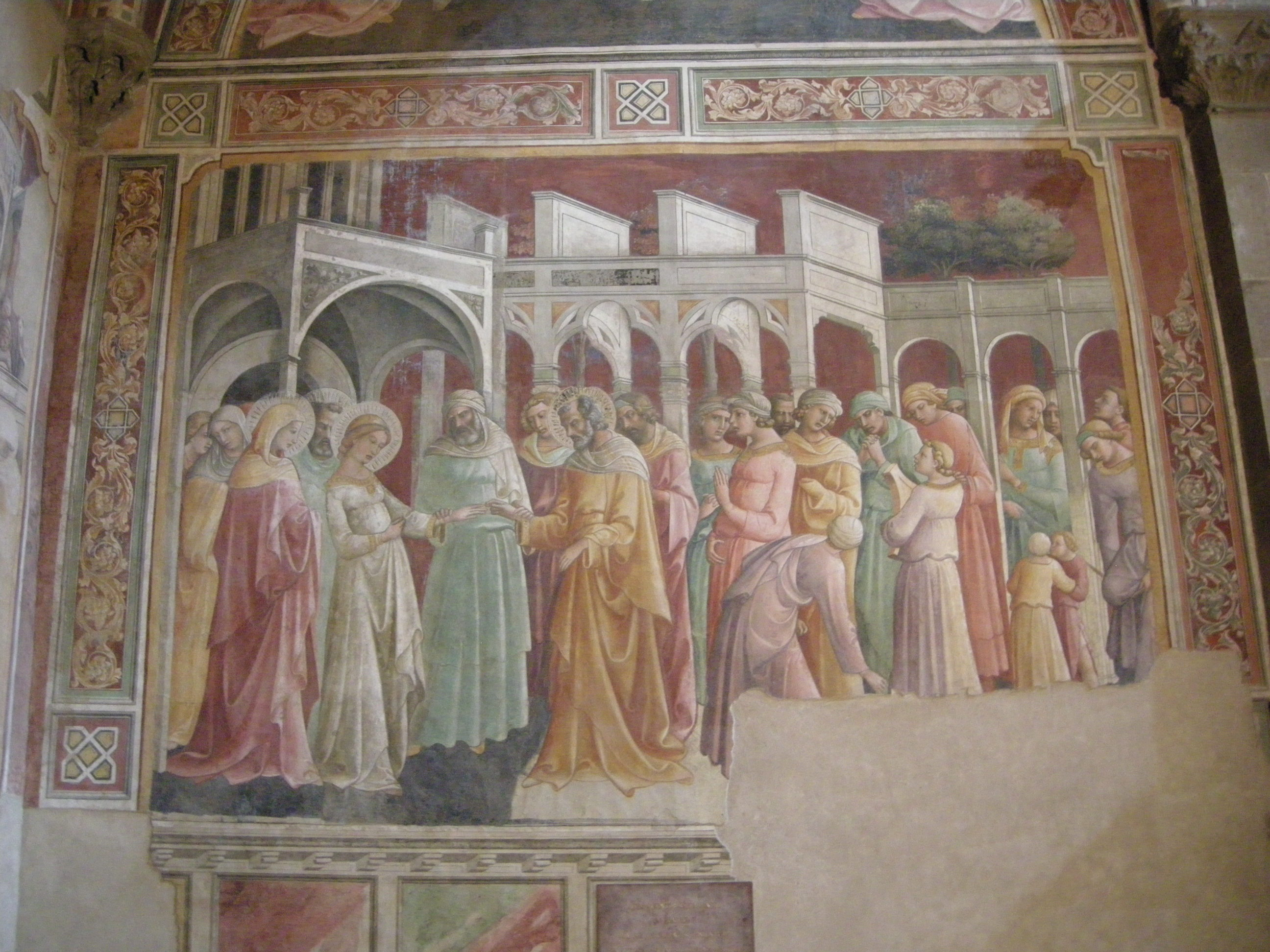 Cappella bartolini salimbeni, 05 sposalizio della vergine